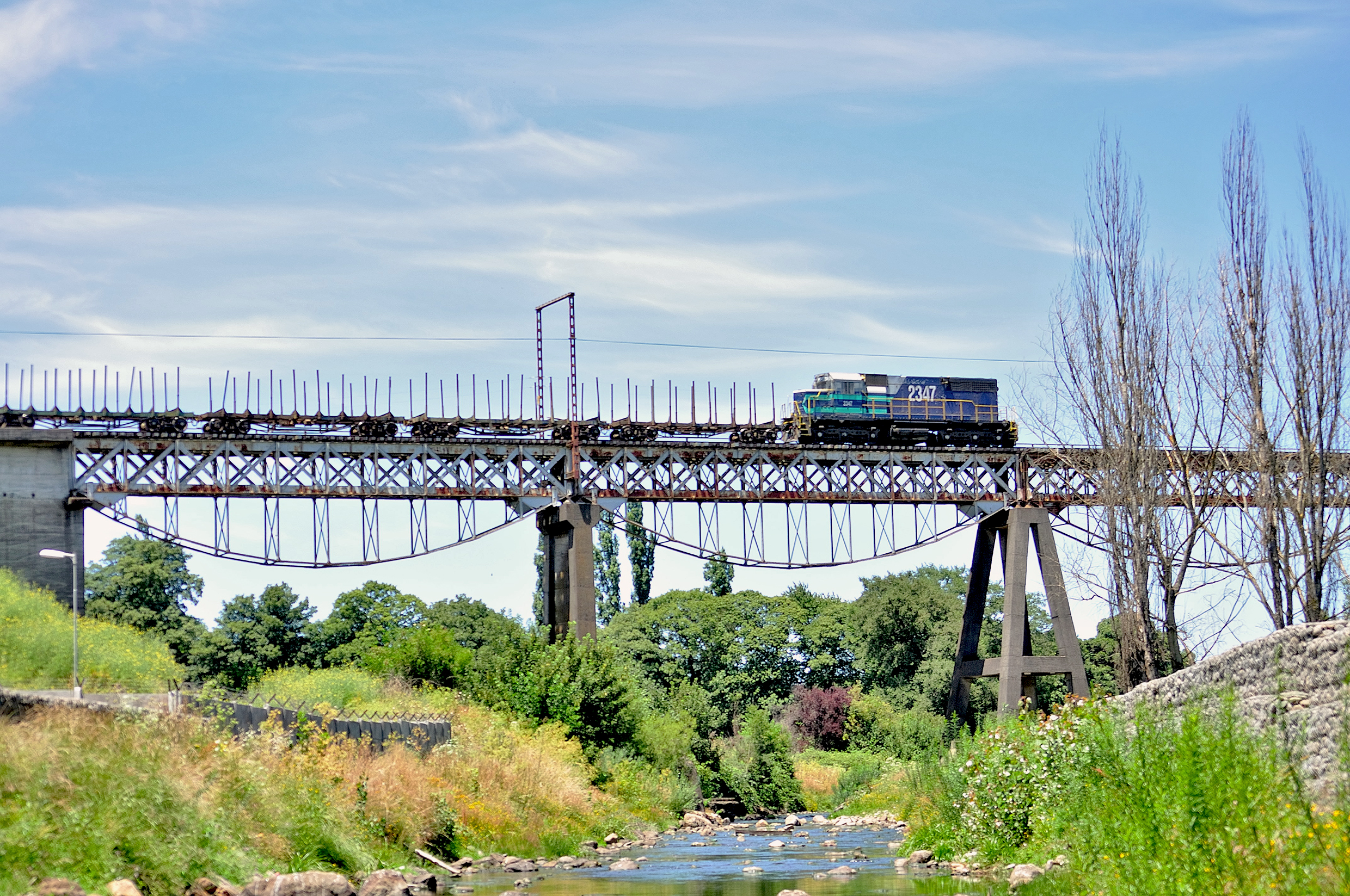 Calor y aguas calmadas, la mejor combinación para meter las patas al estero y esperar así la pasada del tren. D-2347 al mando de un corto tren con carros para el transporte de madera proveniente de Inspector Fernandez, rumbo a Victoria.